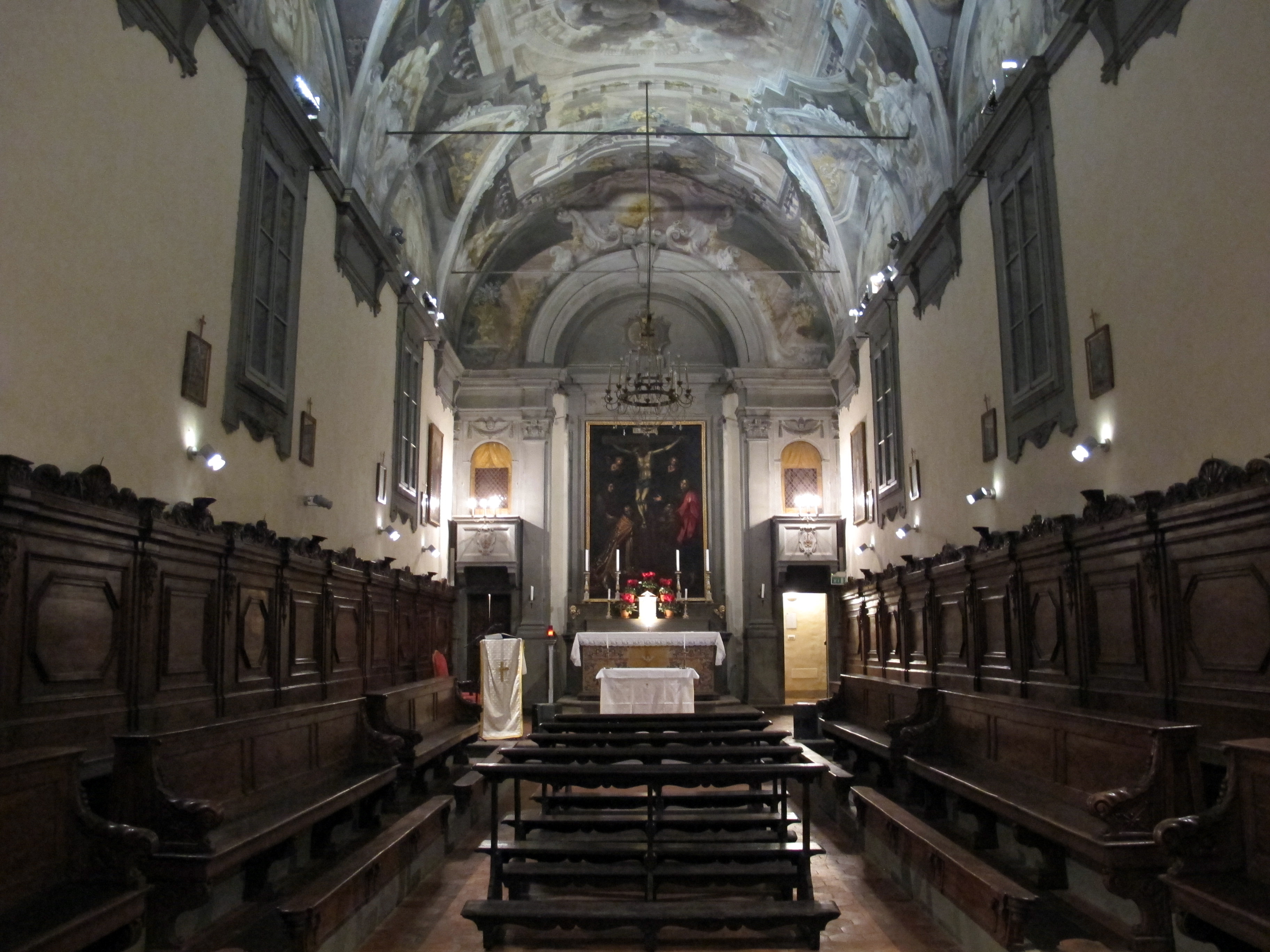 San Niccolò del Ceppo (Firenze)